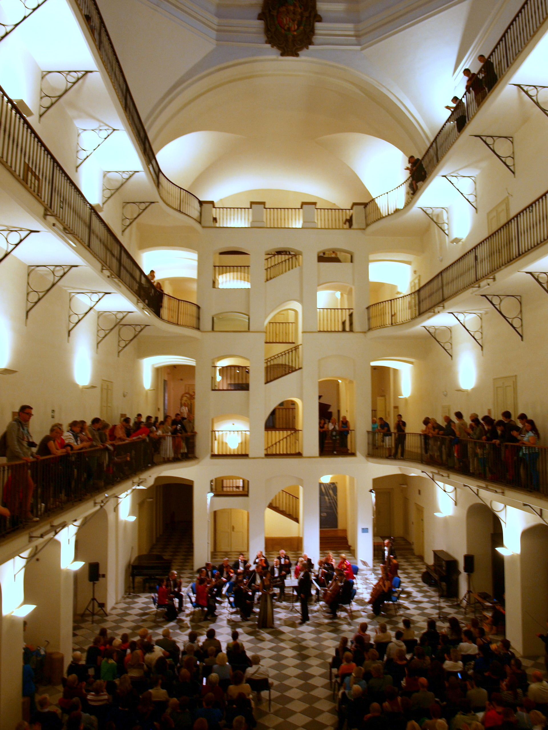 Budova Českého muzea hudby